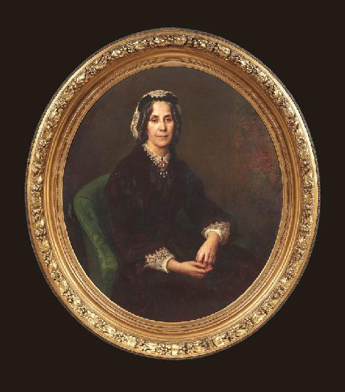 Porträt der auf einem Sessel sitzenden Frau Carl vom Rath, Schwiegermutter des Adolf von Carstanjen.